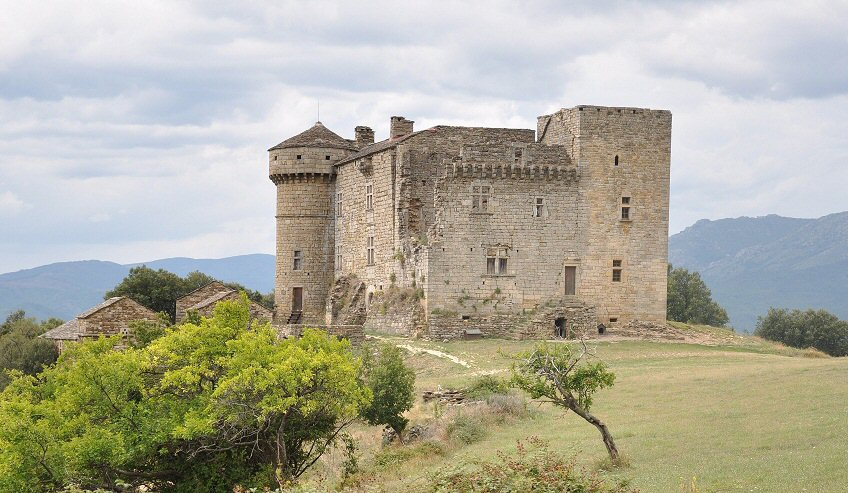 Château d'Aujac en Cévennes 30450